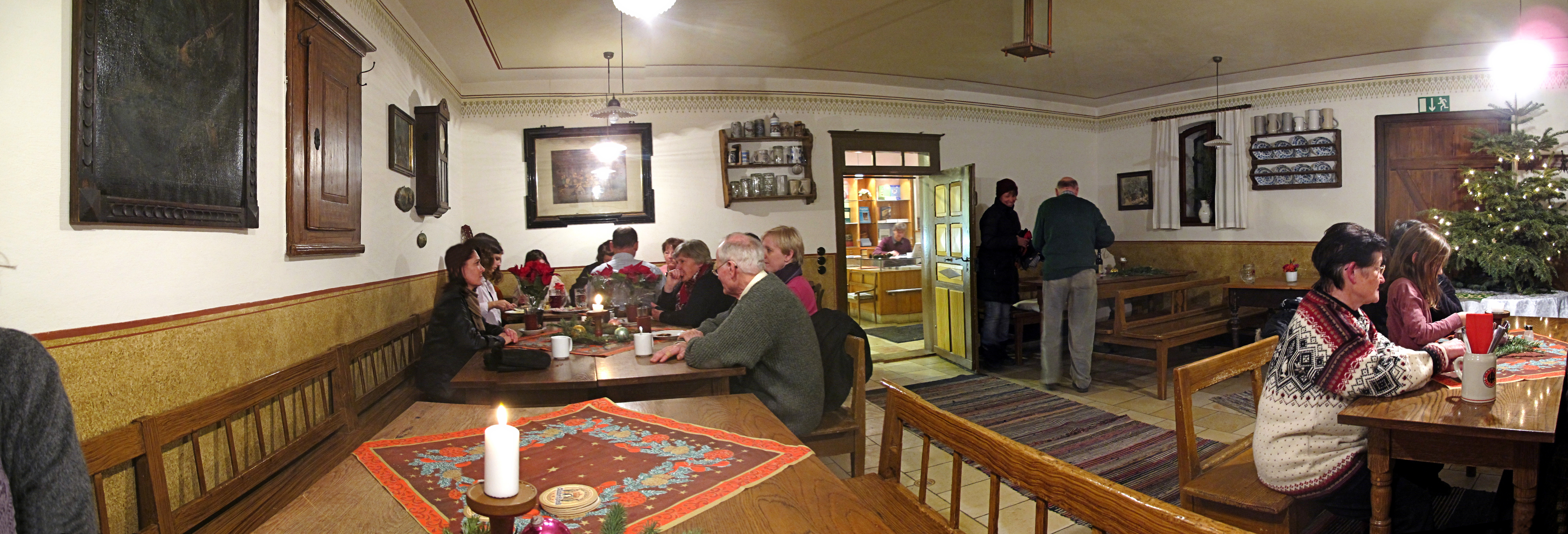 Deutschland, Bayern, Landkreis Fürstenfeldbruck, Bauernhofmuseum "Jexhof", Die "gute Stube"